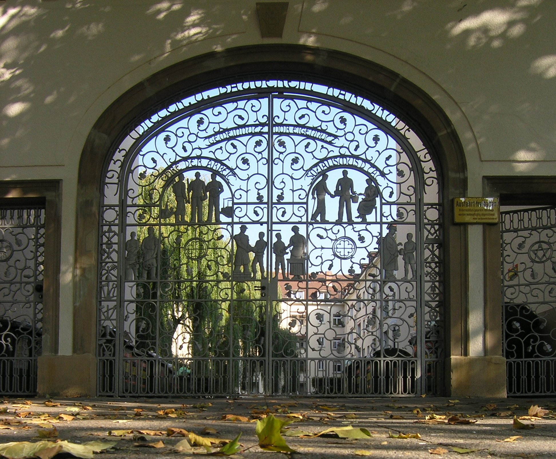 Rechtes Tor des Meidingerblocks in Karlsruhe, Architekt: Emil Brannath